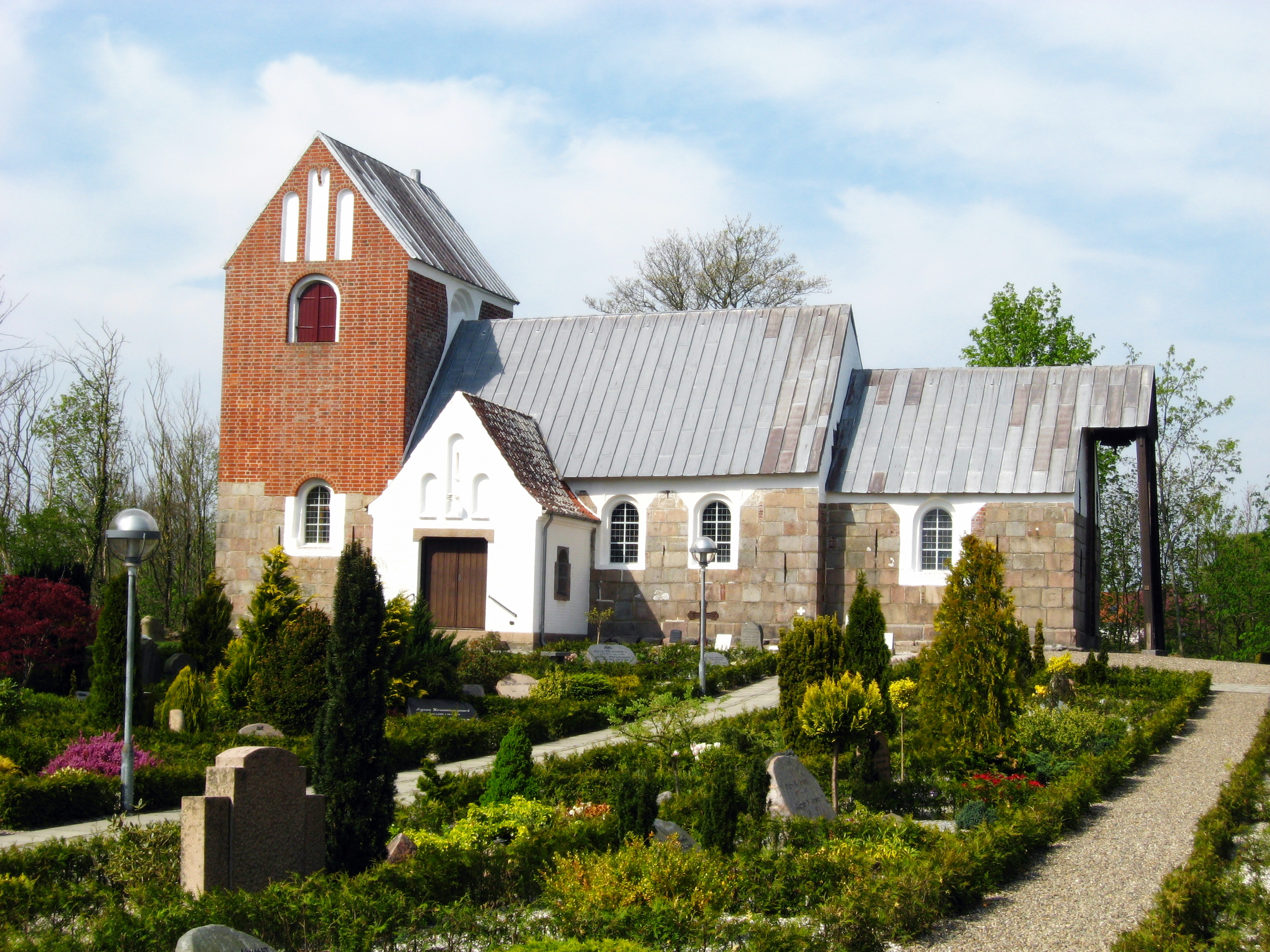 Hellum Kirke, Brønderslev Kommune